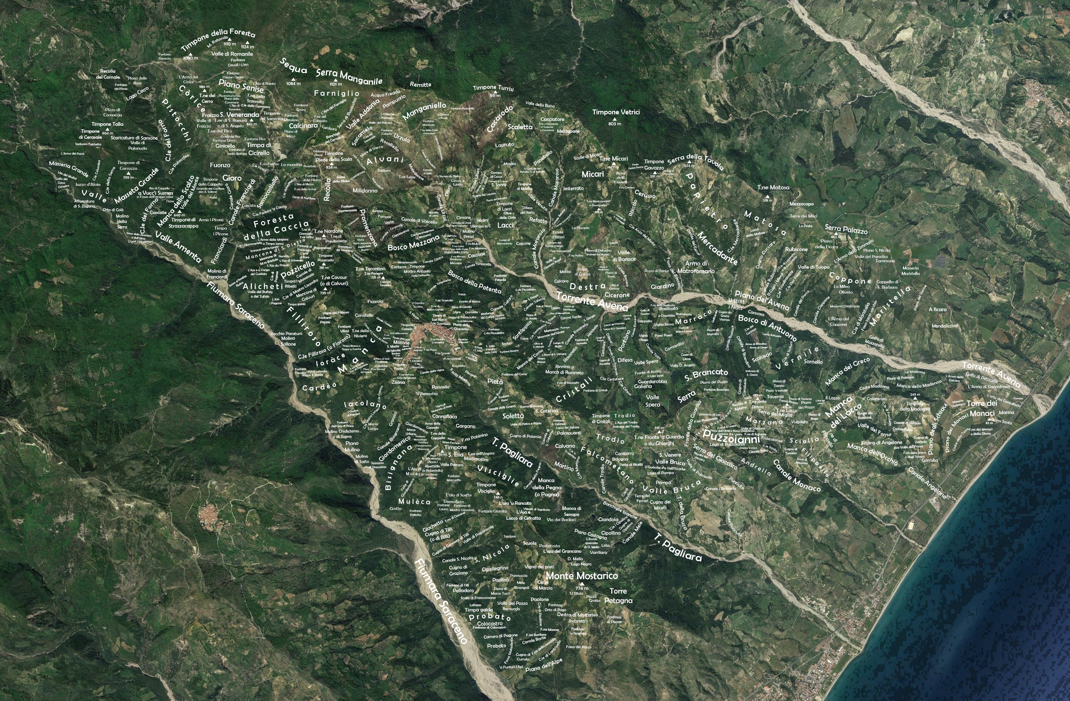 Il territorio di Albidona è fra i più vasti dell'Alto Ionio ed è dominato dai crinali montuosi del Manganile e di Mostarico, oltre che dai letti delle fiumare Saraceno, Avena e Pagliara.